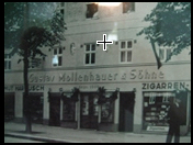 Bis ca. 1968 war die Firma in der Wilhelmshöher Allee